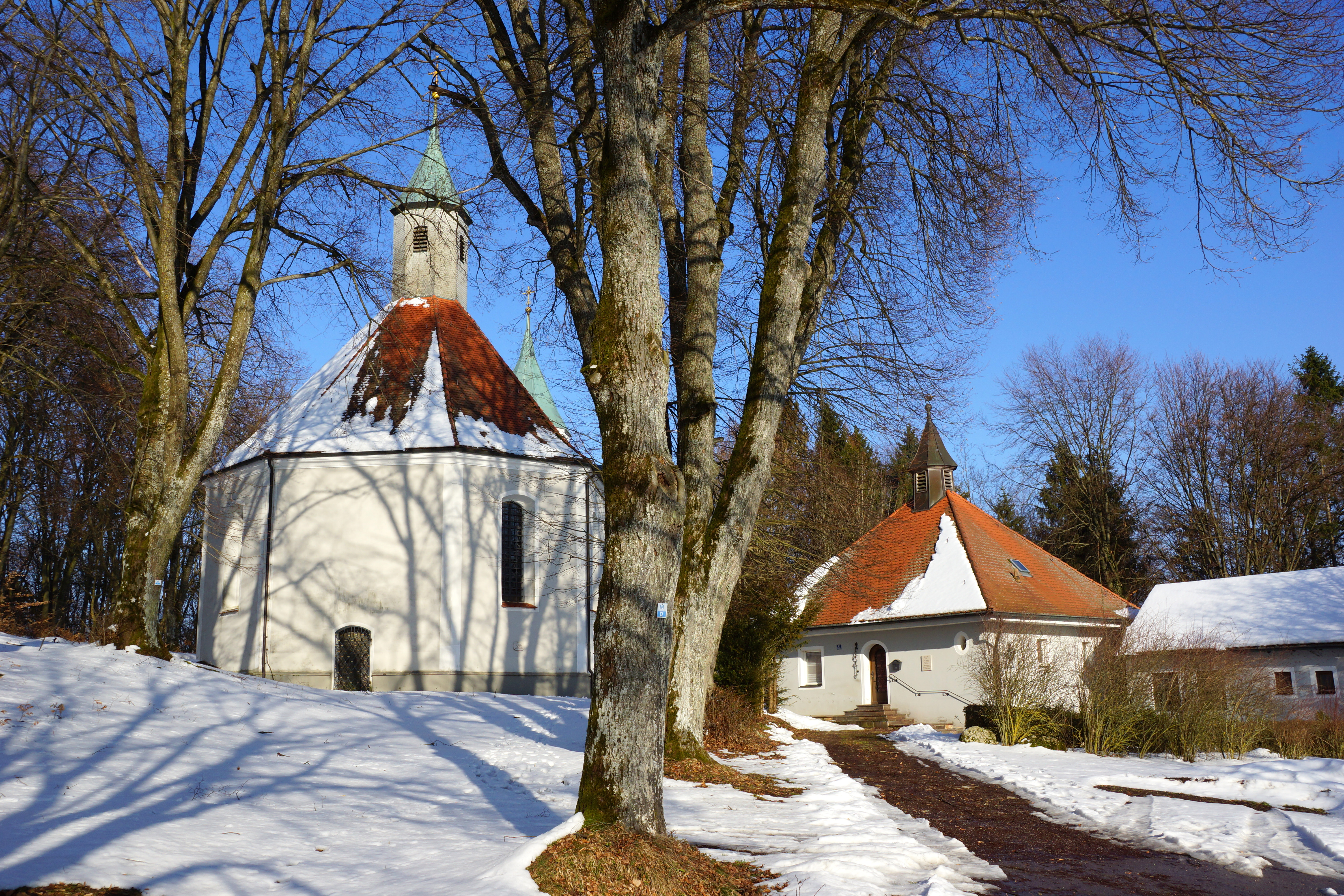 Herz-Jesu-Berg bei Velburg